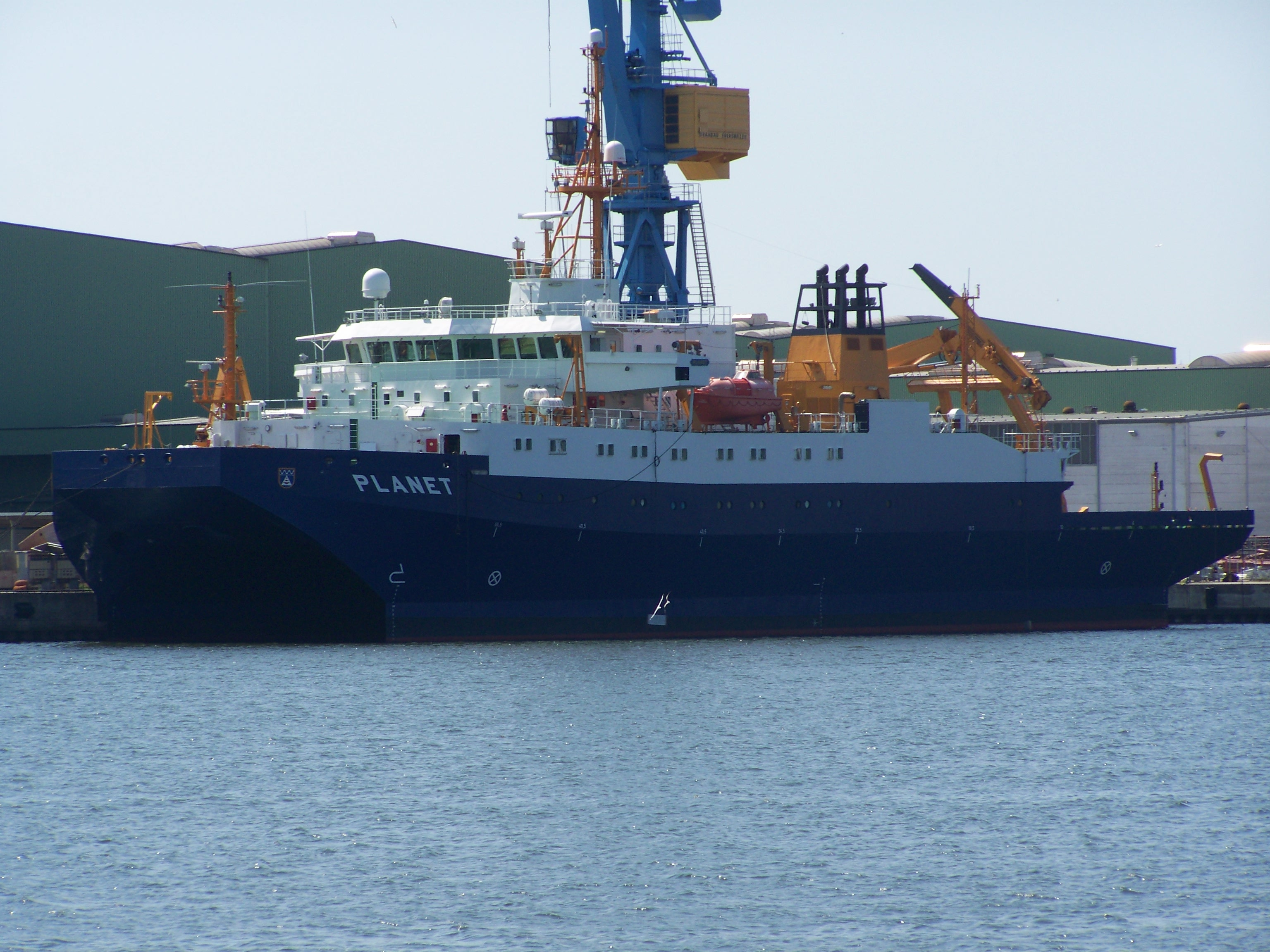 Wehrforschungsschiff Planet vor der Stralsunder Volkswerft.